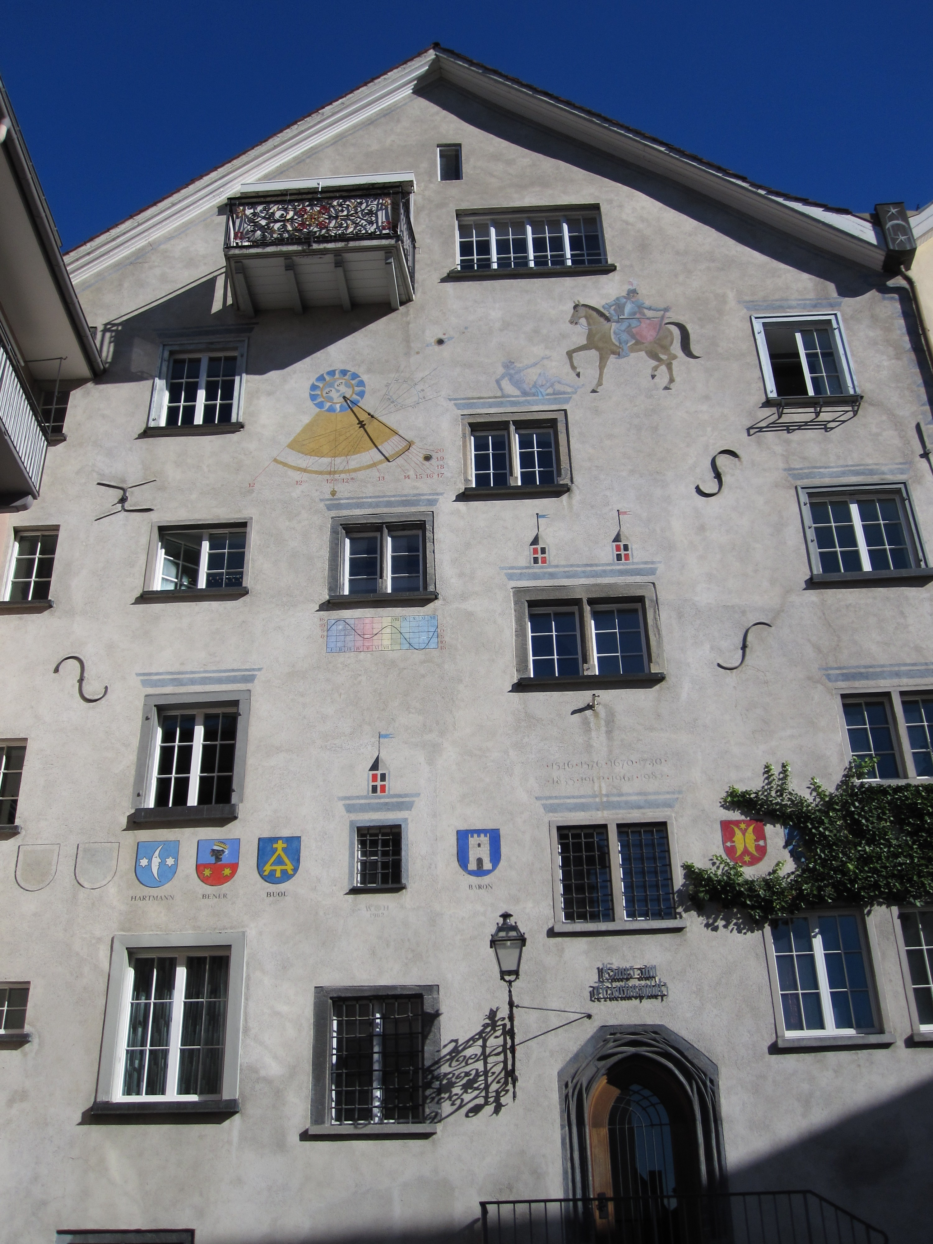 das Haus am Martinsplatz in Chur (Kanton Graubünden, Schweiz) zwischen Martinsplatz und Arcas